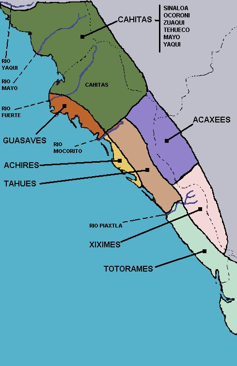 Sinaloa 1530 de acuerdo a: Ortega Noriega, Sergio (1999) Breve Historia de Sinaloa ISBN 968-16-5378-5 Texto en la web